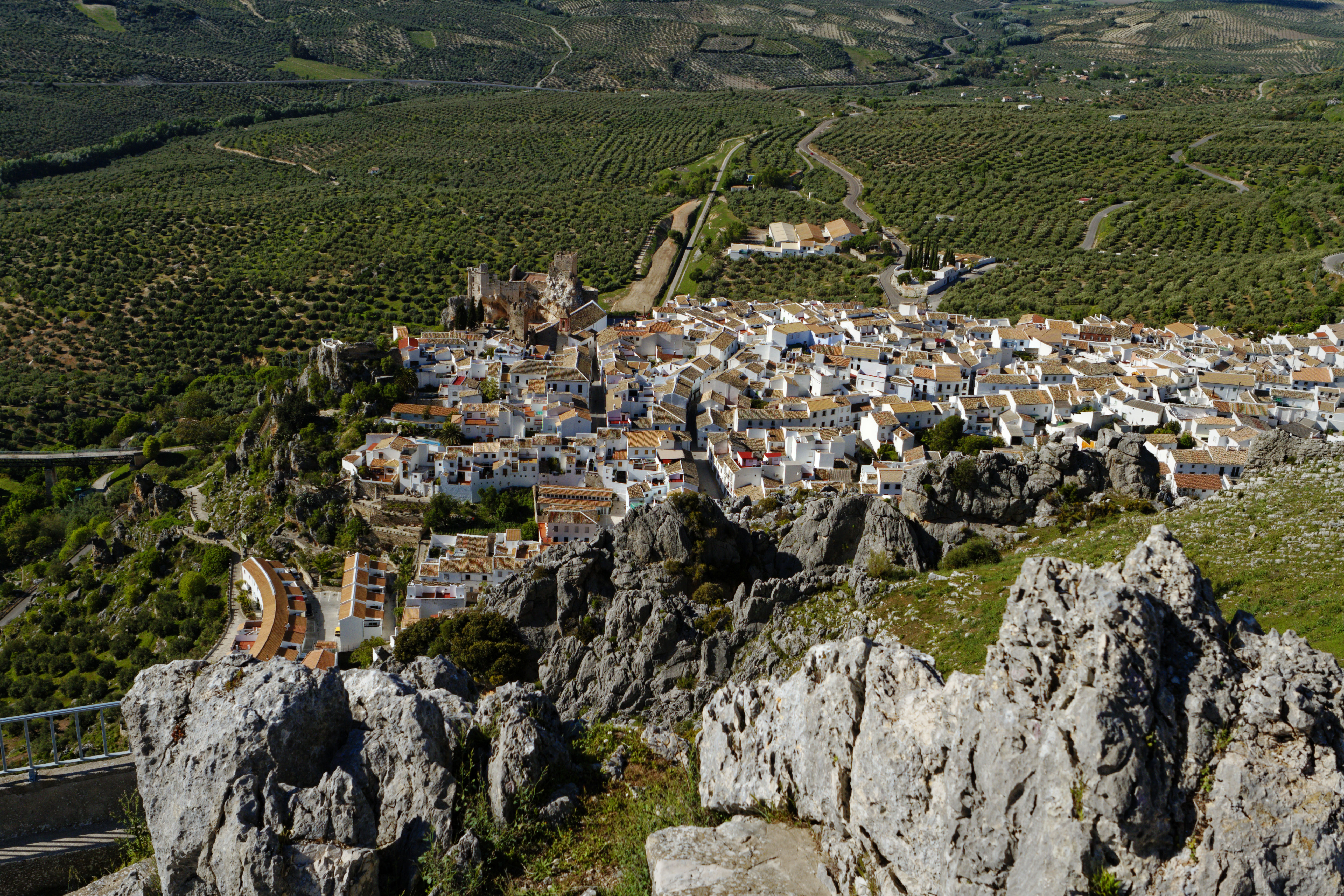 Sierras Subbéticas This is a photography of a Special Area of Conservation in Spain with the ID: ES6130002. Natura2000 entry, EEA entry